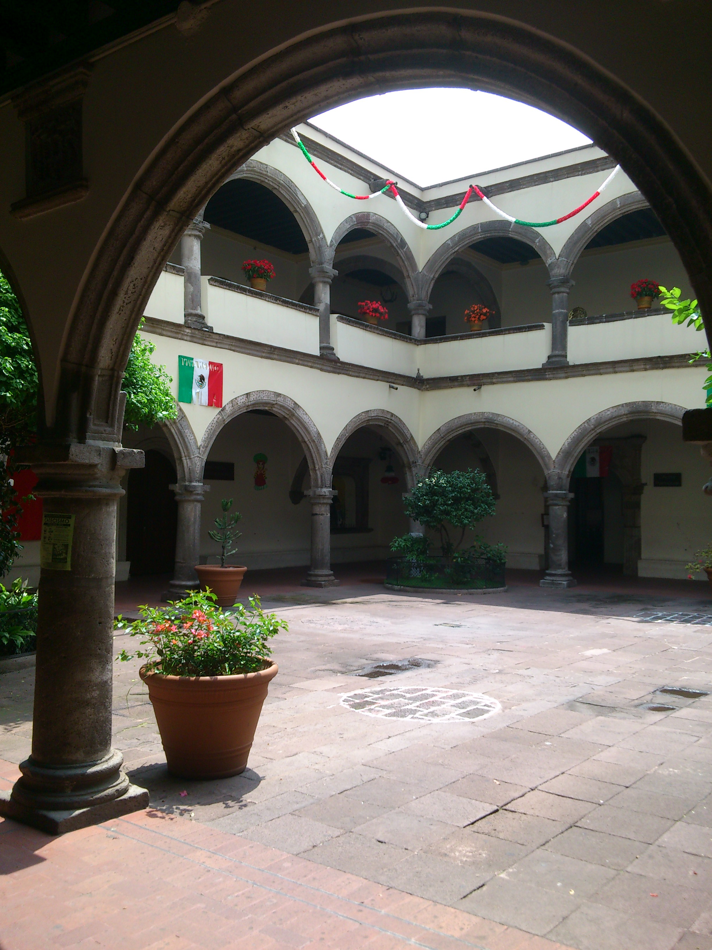 Vista hacia el patio del Claustro desde el interior de la Parroquia de la Purificación.